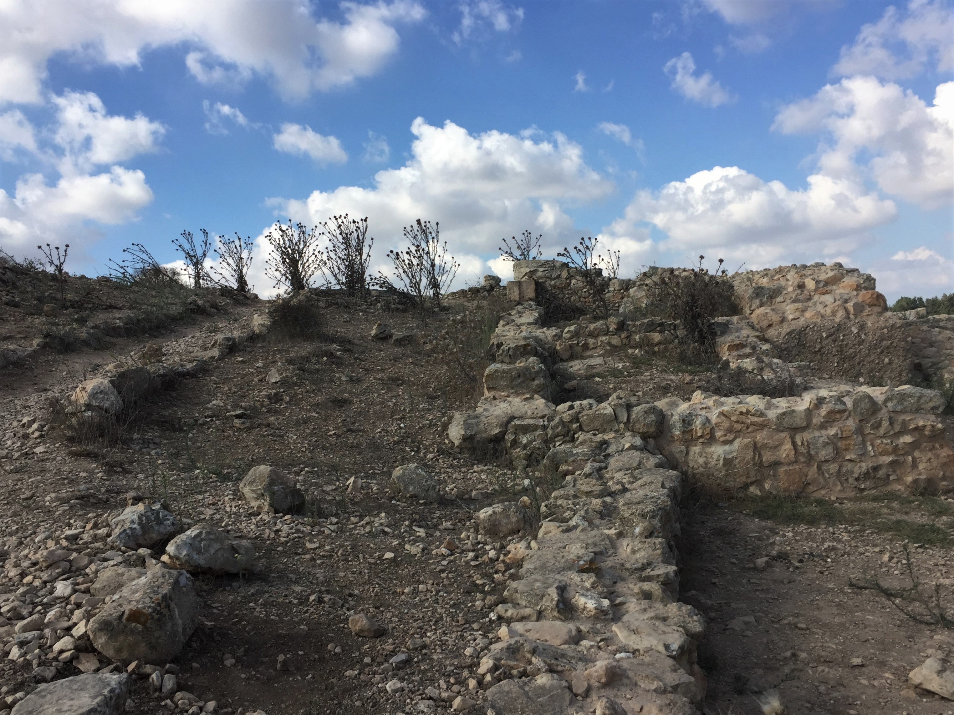 יודפת (או יוטבת) העתיקה ממוקמת בלב רכס הרי יוטבת שבמרכז הגליל התחתון, דרומית מזרחית למושב יודפת המודרני, 22 ק"מ דרום מזרחית לעכו ו-9 ק"מ צפונית לציפורי. העיר יושבת על גבעה נמוכה בגובה 419 מ' מעל פני הים, מוקפת בשרשרת פסגות הגבוהות ממנה. ממזרח ומצפון מזרח מקיף אותה נחל יודפת ויובל שלו מקיף אותה ממערב, מדרום ומצפון מערב. אלו יוצרים מדרונות תלולים משלושת צדי הגבעה כך שזו נגישה רק מצד צפון, שם נמצא אוכף המחבר אותה להר מימין. יודפת מוזכרת במשנה ובספרי יוסף בן מתתיהו.